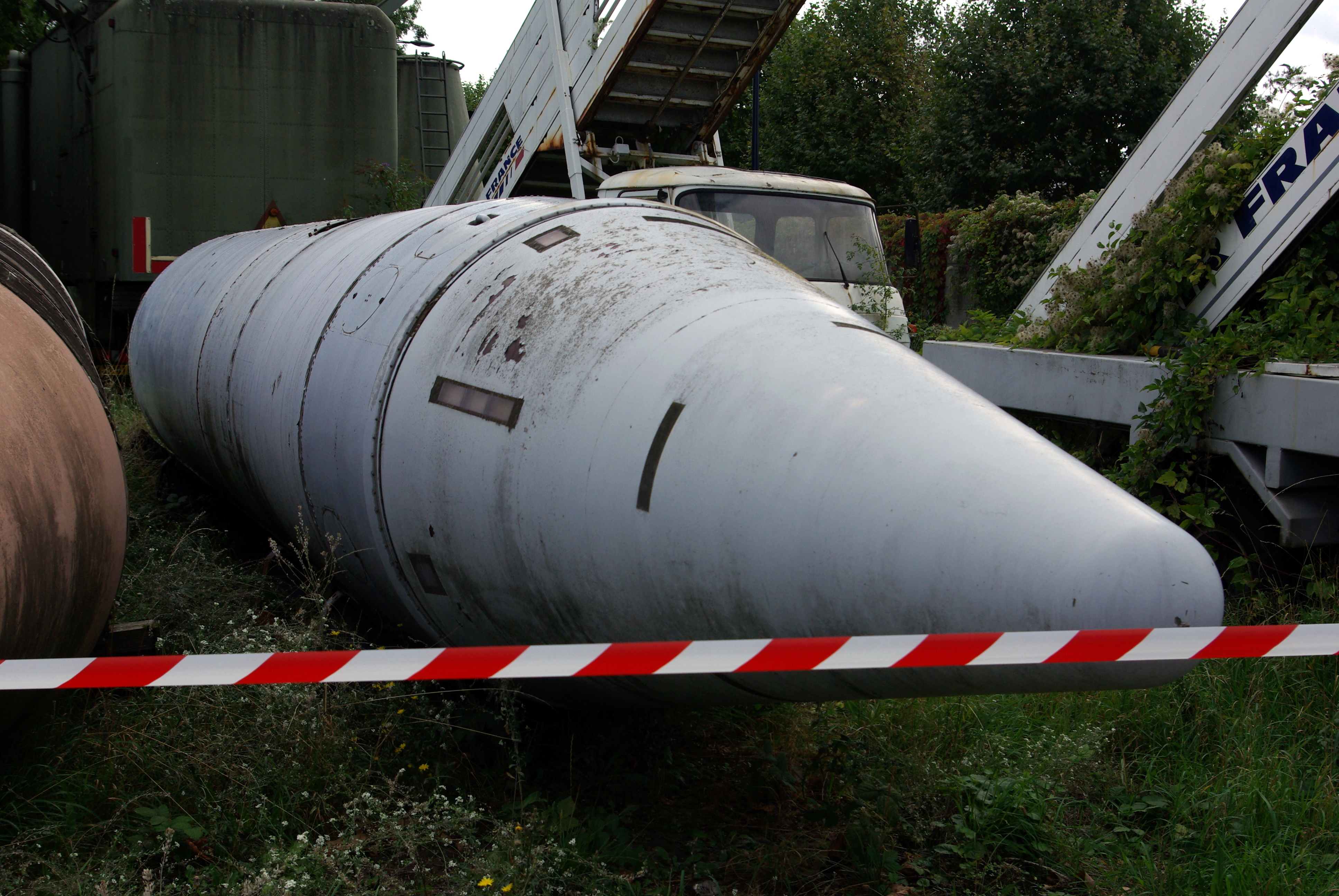 Missile Mer-Sol Ballistique Stratégique (MSBS) M20 dans les réserves du musée de l'Air et de l'Espace.